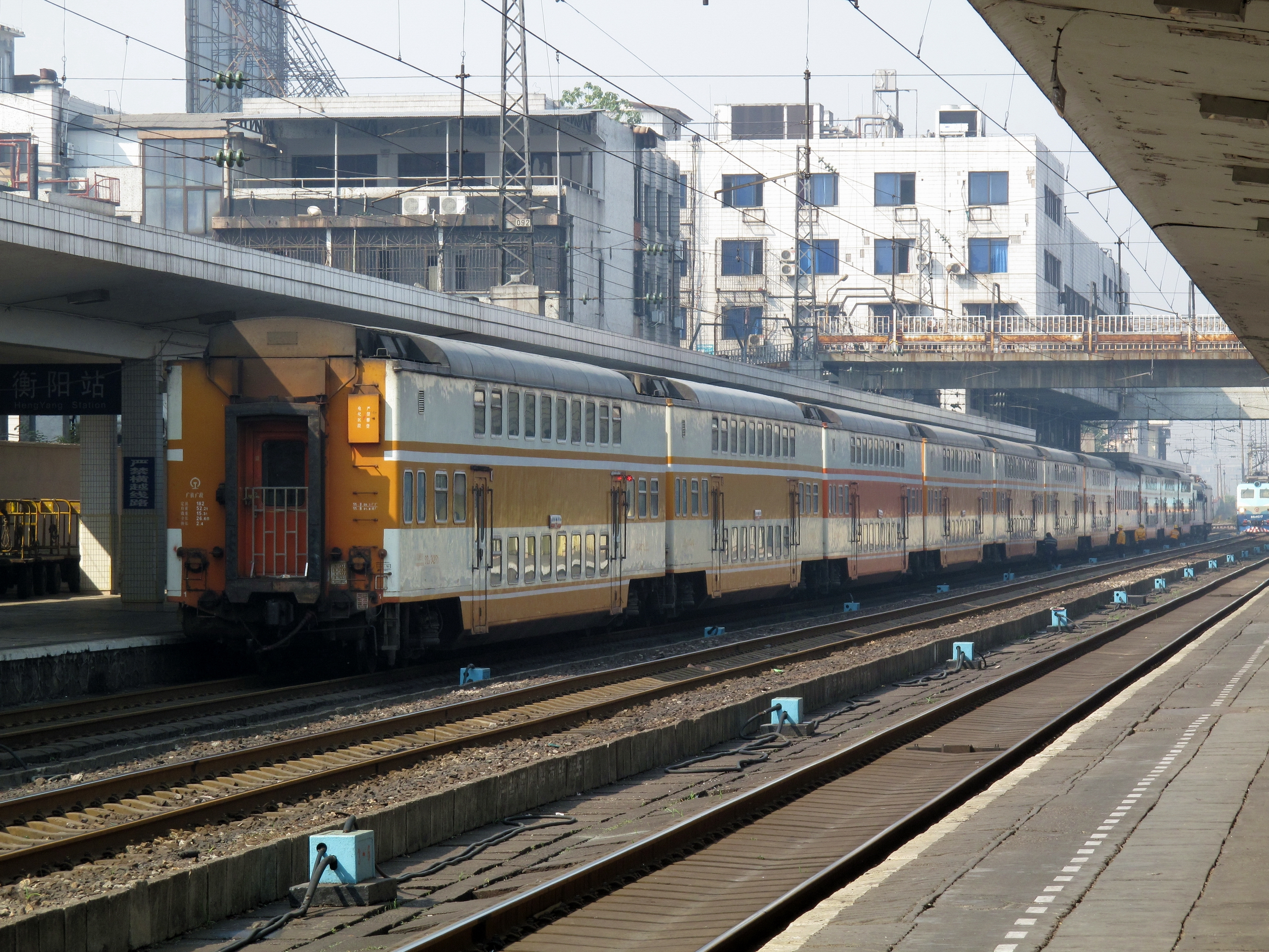 中文（中国大陆）: 一列早期型SYZ25B型双层客车，拍摄于湖南衡阳站